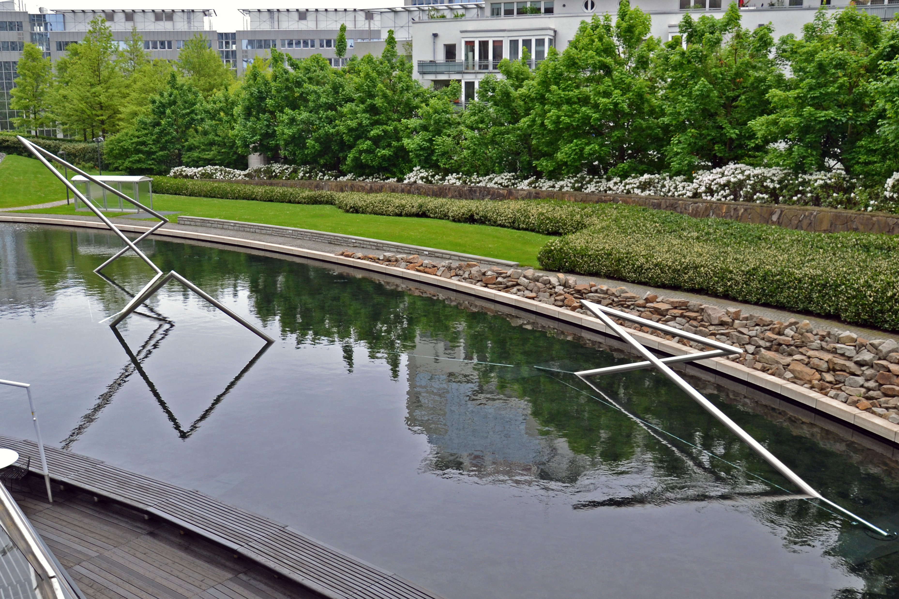 Plastik "Springende Linie" von Norbert Thomas am RWE-Turm in Essen